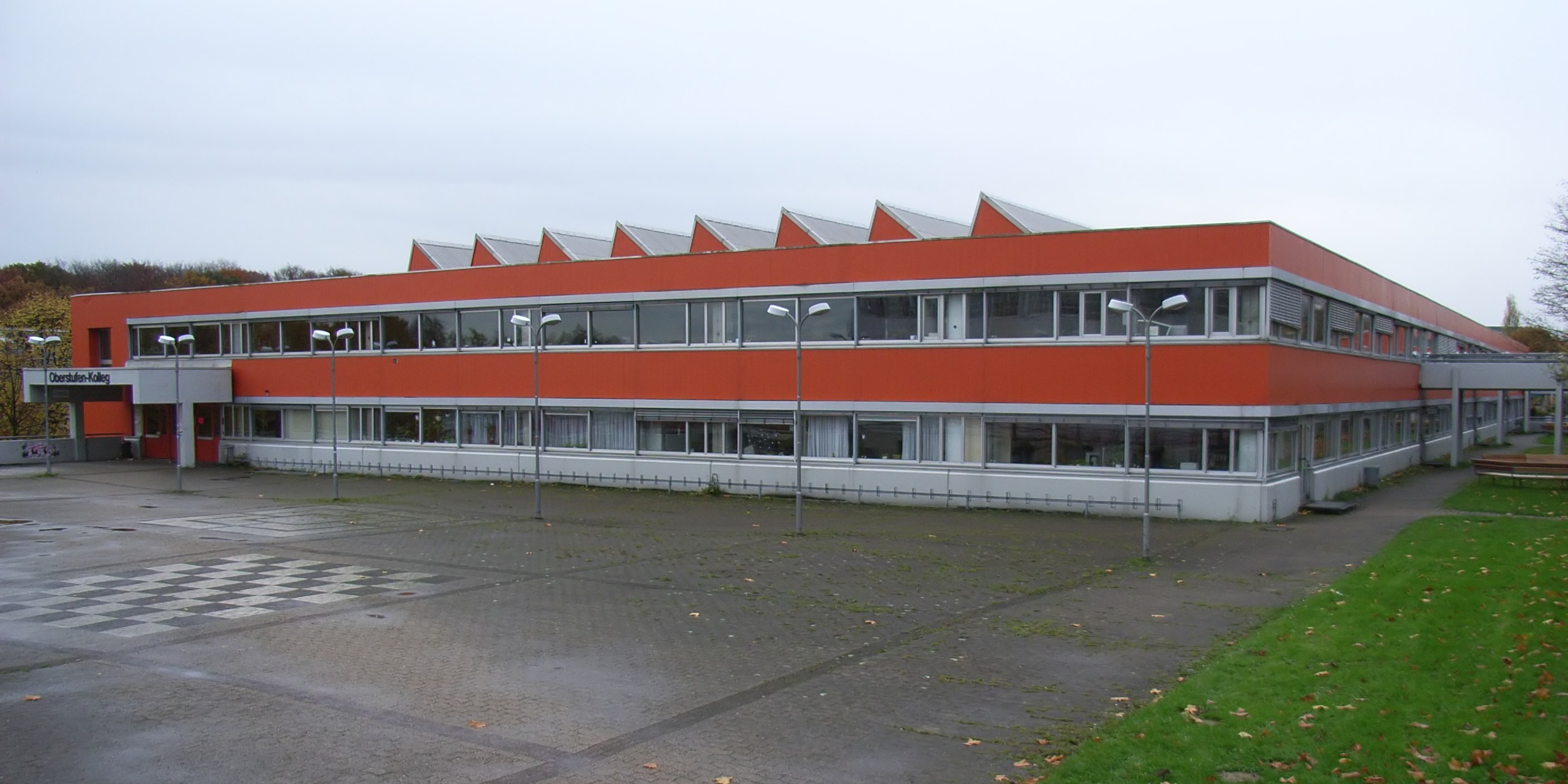 Bielefeld, Deutschland: Oberstufen-Kolleg